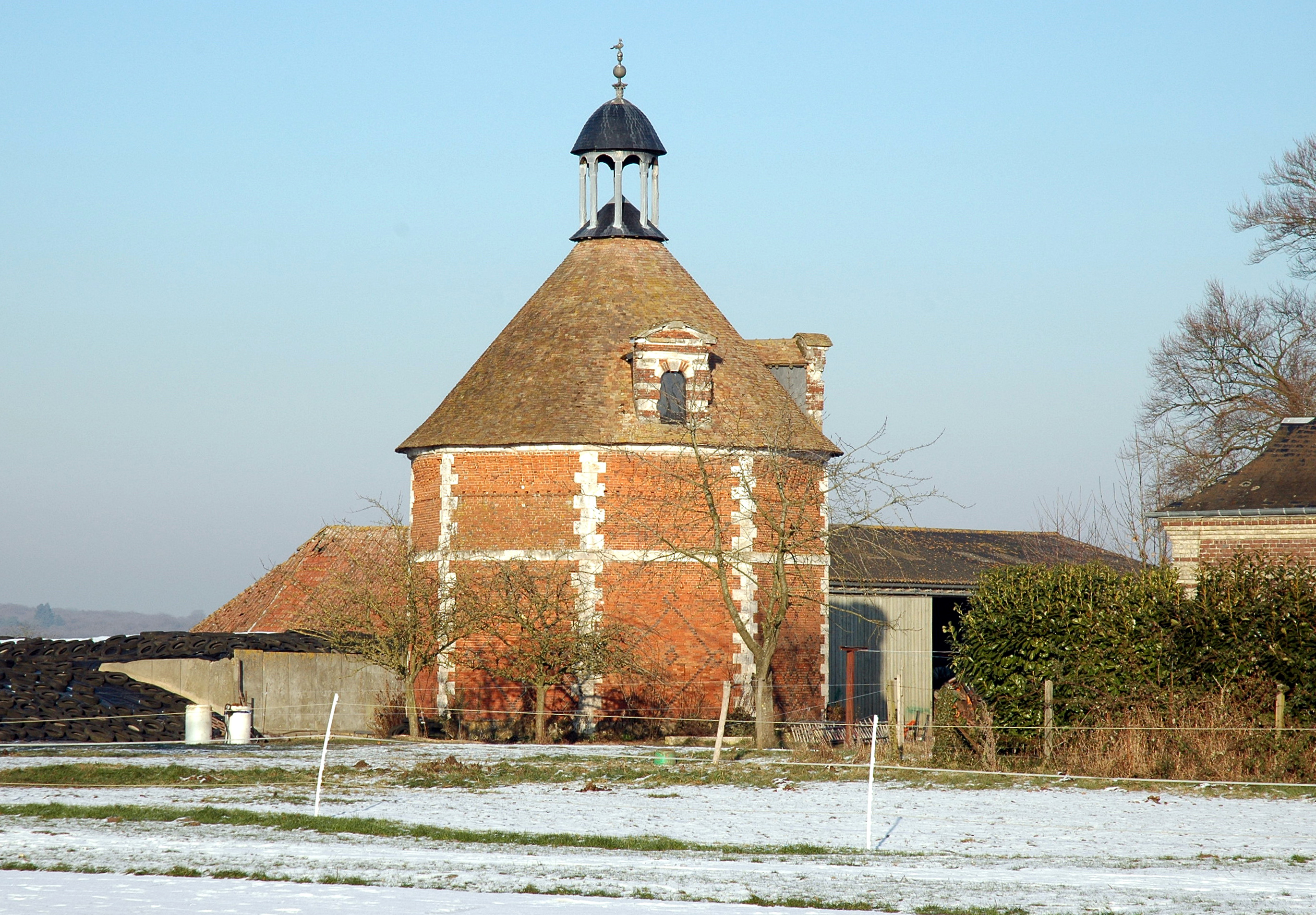 Bourgtheroulde-Infreville (Eure, France). Le colombier de la ferme du Logis.